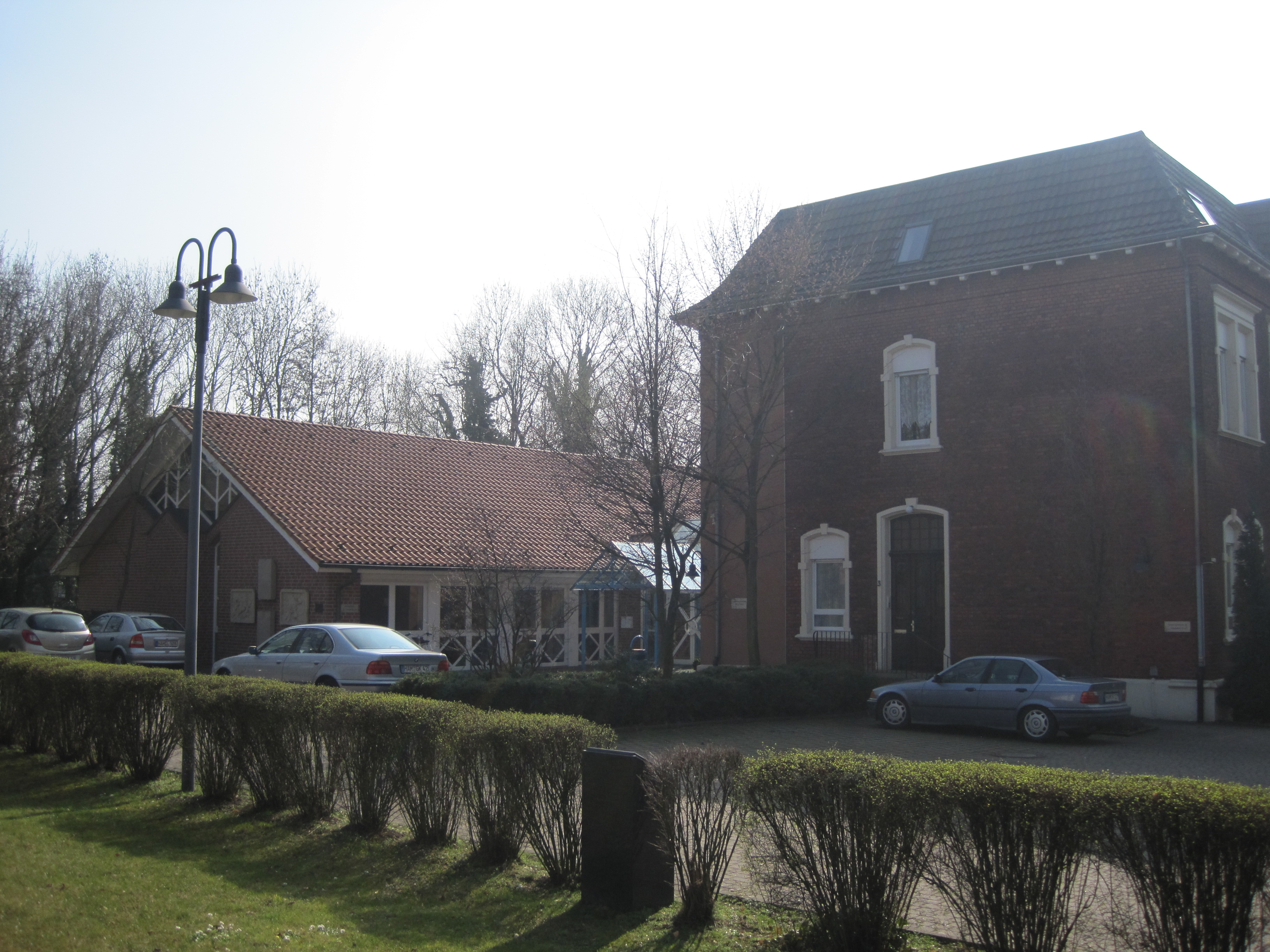 Das Foto zeigt Pfarrheim und Bücherei (Altenbegegnungsstätte) der St. Stephanus-Kirche in Hamm-Bockum-Hövel.